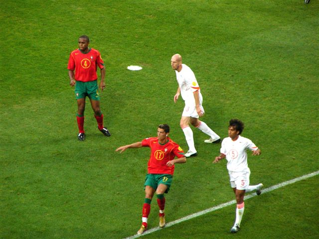 Spielszene aus dem Halbfinale der Fußball-Europameisterschaft 2004 zwischen Portugal und der Niederlande: (v.l.n.r.) die Portugiesen Jorge Andrade und Cristiano Ronaldo im Duell mit den Niederländern Jaap Stam und Giovanni van Bronckhorst.